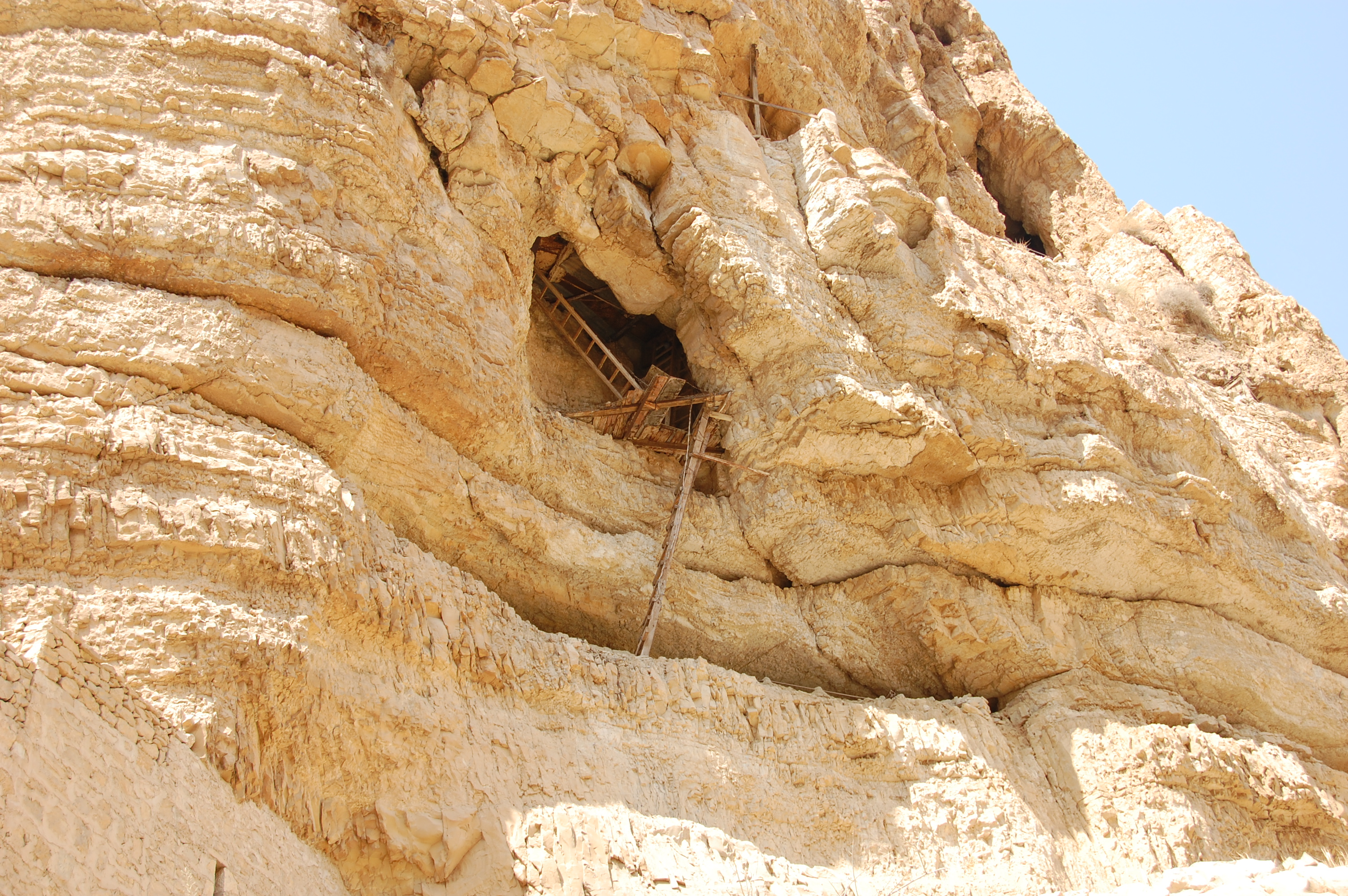 larva in Palestinian desert